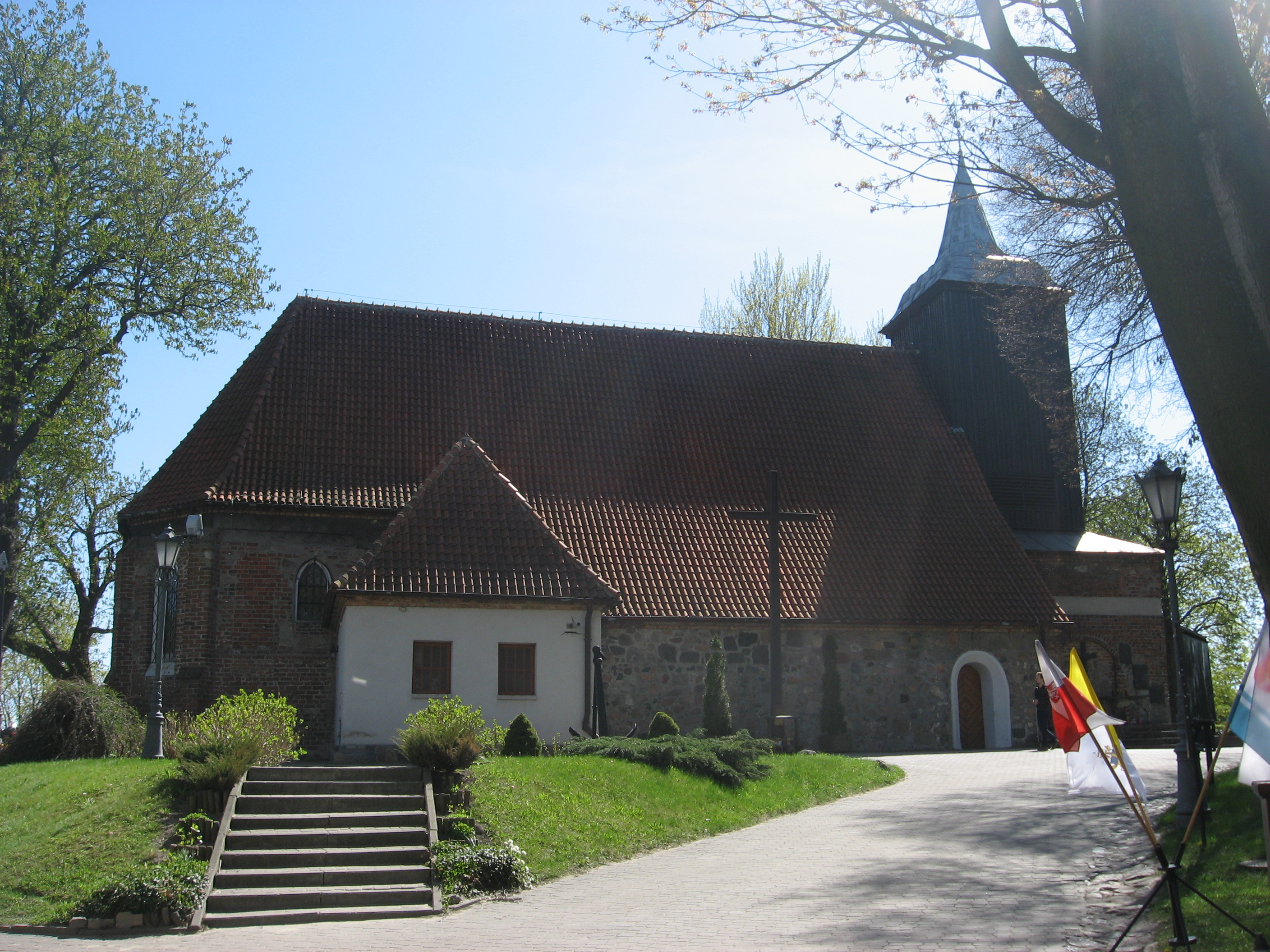 Kościół parafialny pw. św. Michała Archanioła w Gdyni Oksywiu